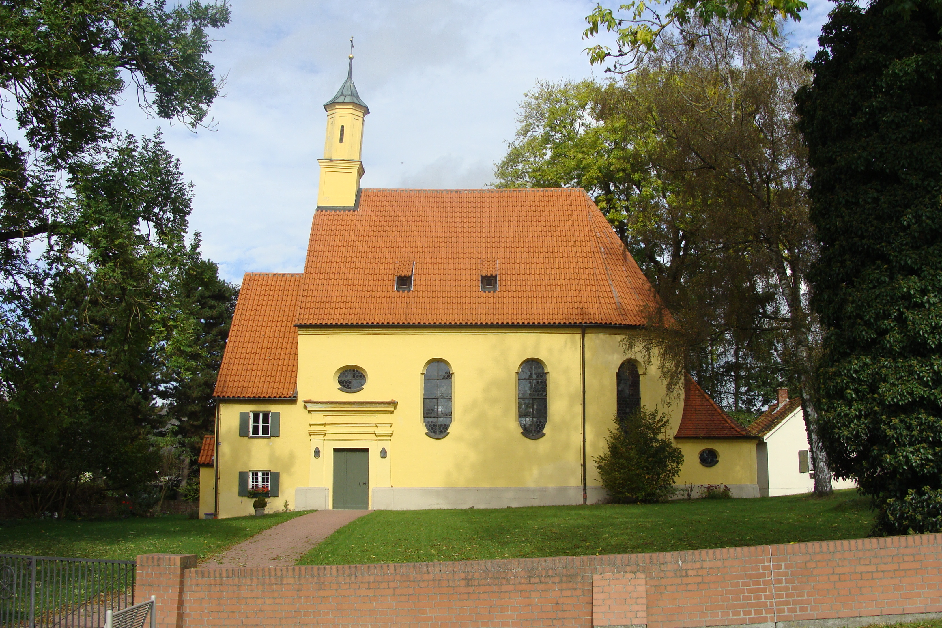 Kirche St. Stefan, Stefanstraße 22